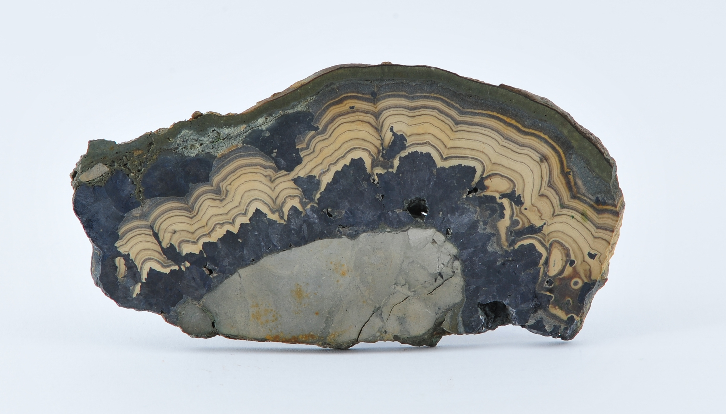 Objektfotografie in Styrobox: Schalenblende, Grube Schmalgraf. La Calamine / Kelmis (Belgium)